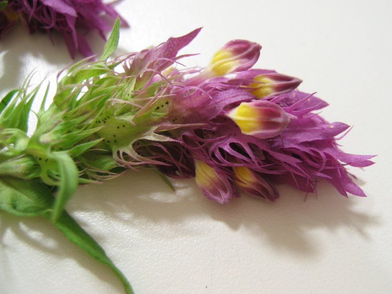 Acker-Wachtelweizen Melampyrum arvense, Müritz-Gebiet